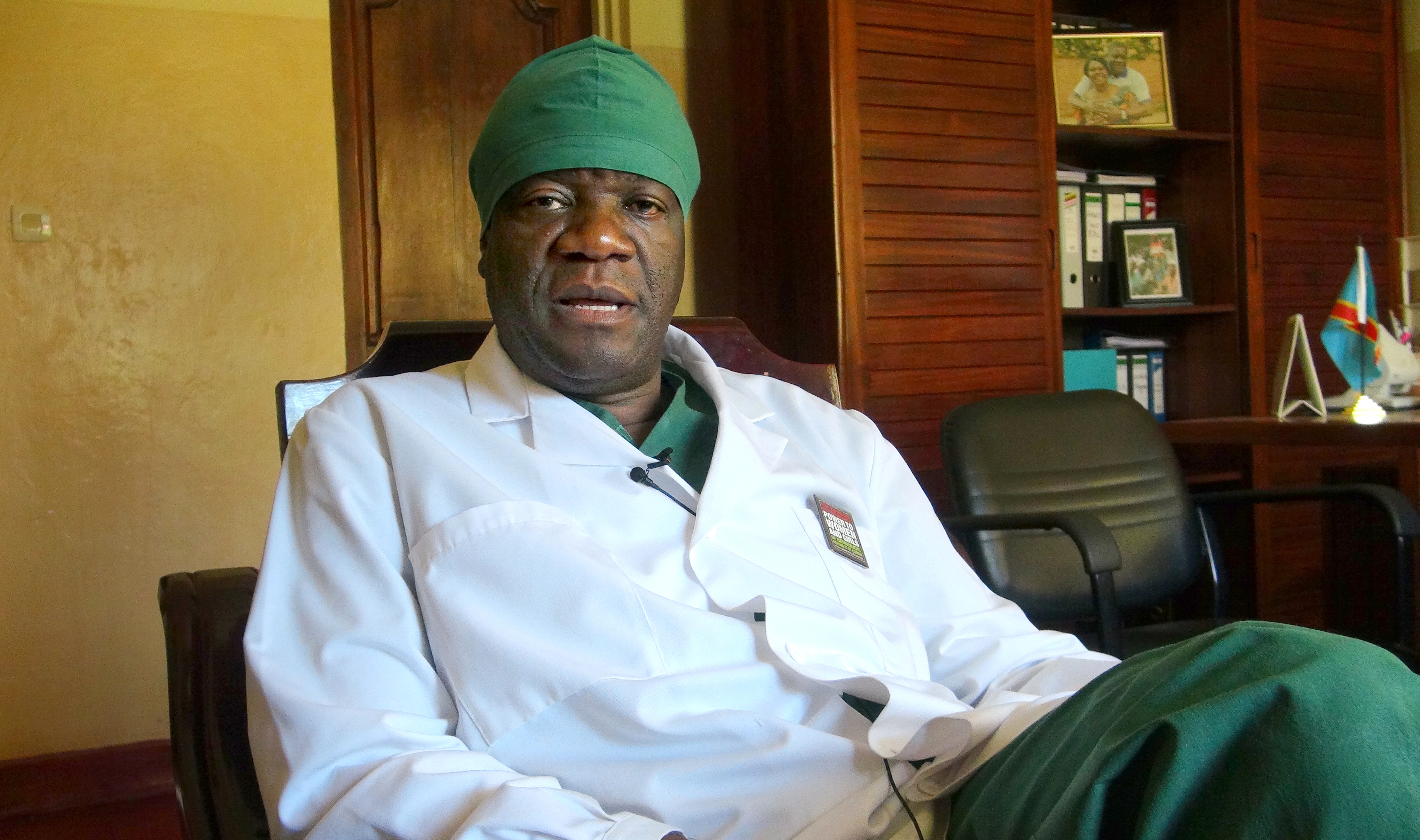 Denis Mukwege, gynécologue congolais, dans son bureau de Panzi, le 6 février 2013,PINAULT/VOA (Image de la VOA, confirmée par la légende "VOA" en bas, à droite de l'image).